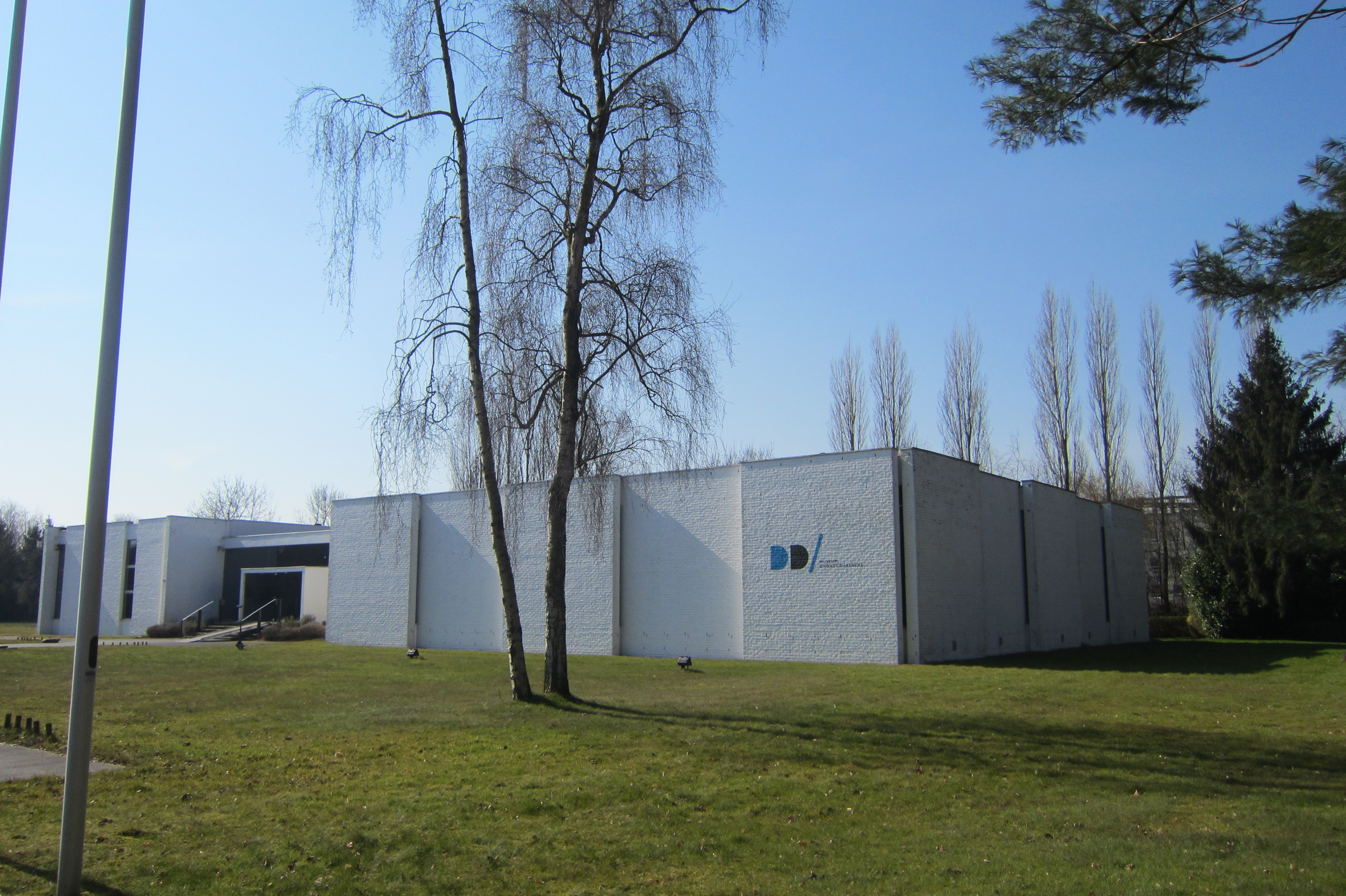 Museum Dhondt-Dhaenens, Sint-Martens-Latem, België